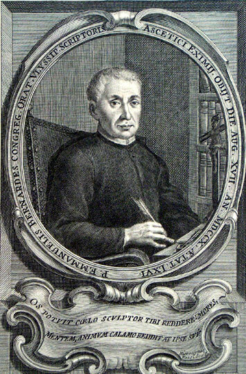 Retrato do Padre Manuel Bernardes. Gravura a buril de Hieronimus Rossi. 1710.